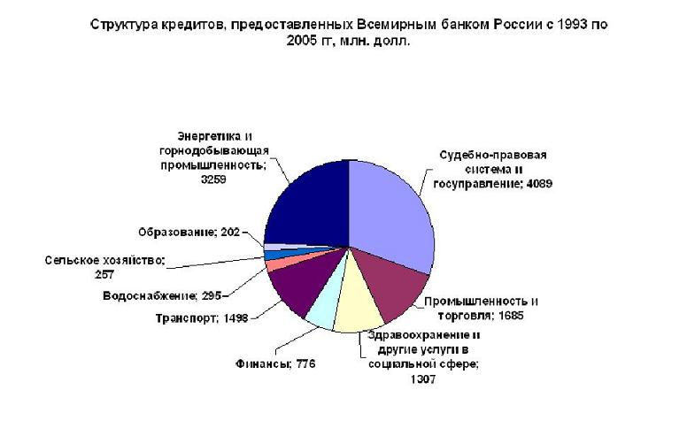 Диаграмма, изображающая структуру кредитов Всемирного банка России